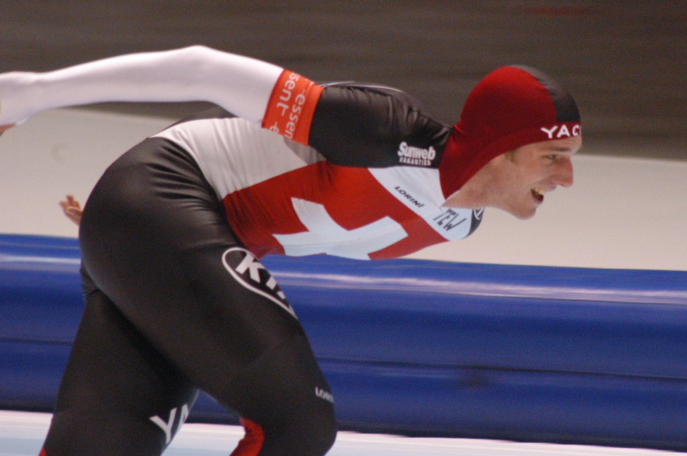 Roger Schneider (SUI) at a World Cup speedskating in Heerenveen (NED)